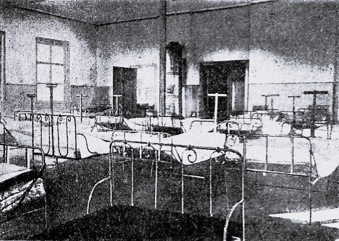 Schlafsaal der Zäglinge im neu erbauten Rettungshaus zu Lübeck. Die linke Tür führte in das Zimmer des Gehilfen.